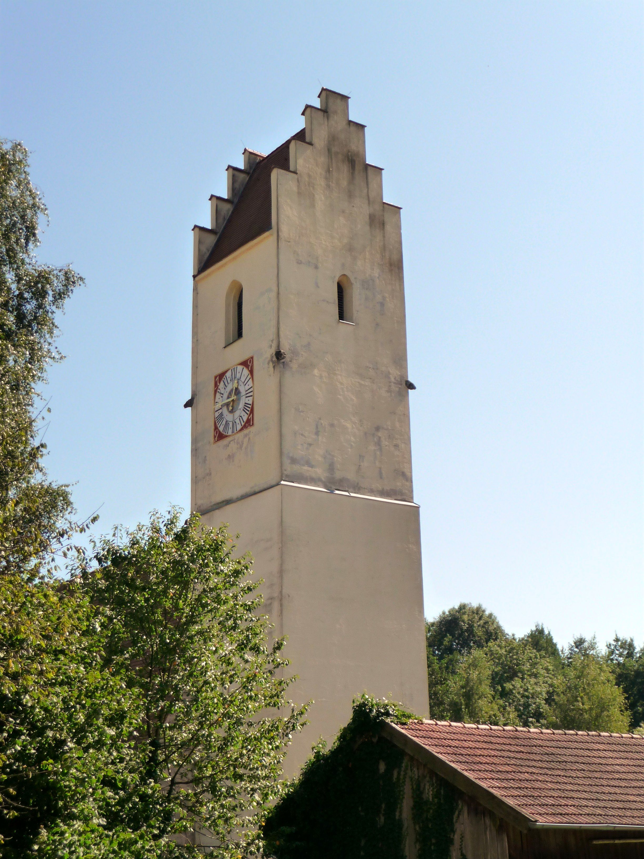 Der Turm der Pfarrkirche von Alzgern, Stadt Neuötting